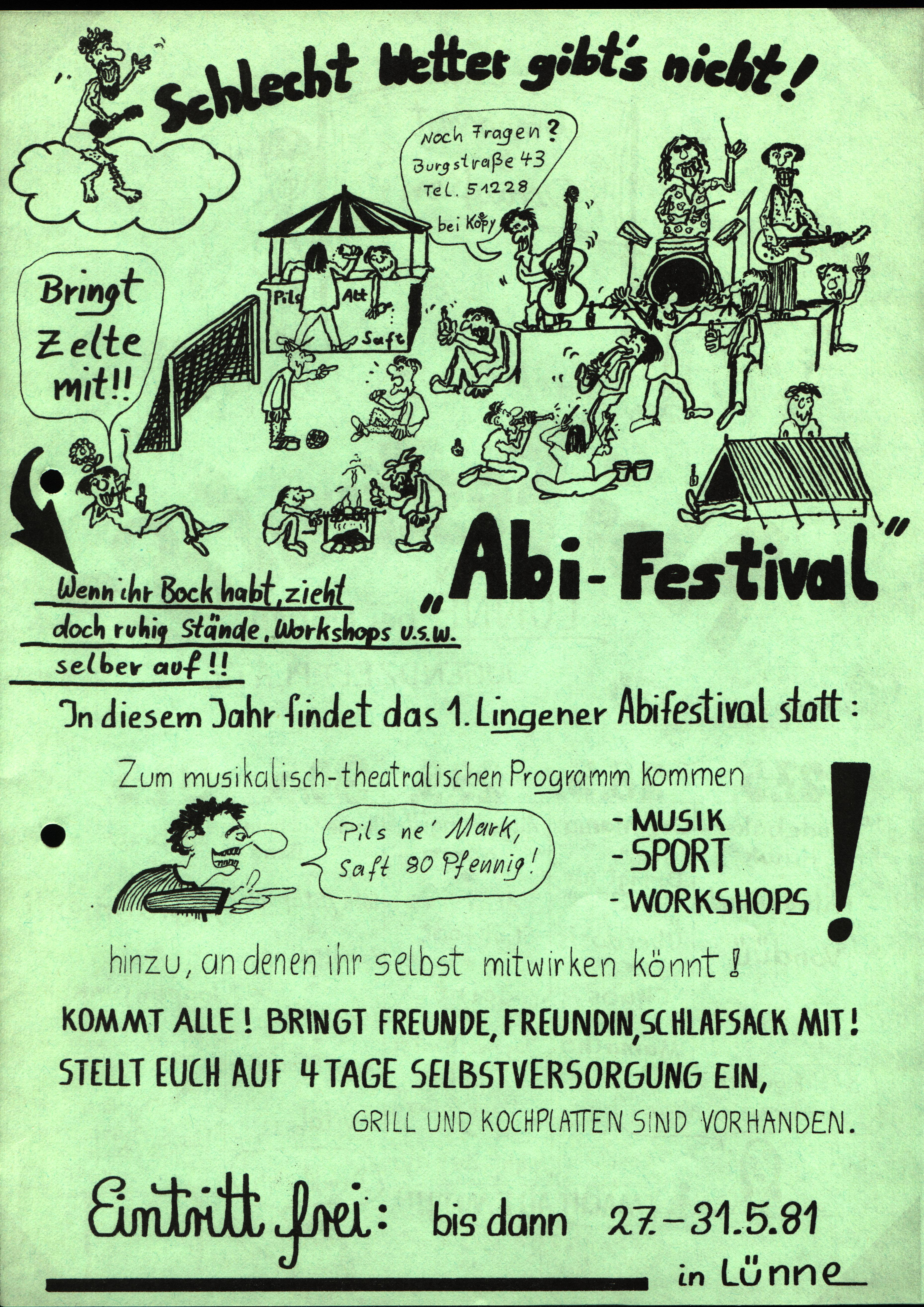 Plakat Abifestival von 1981